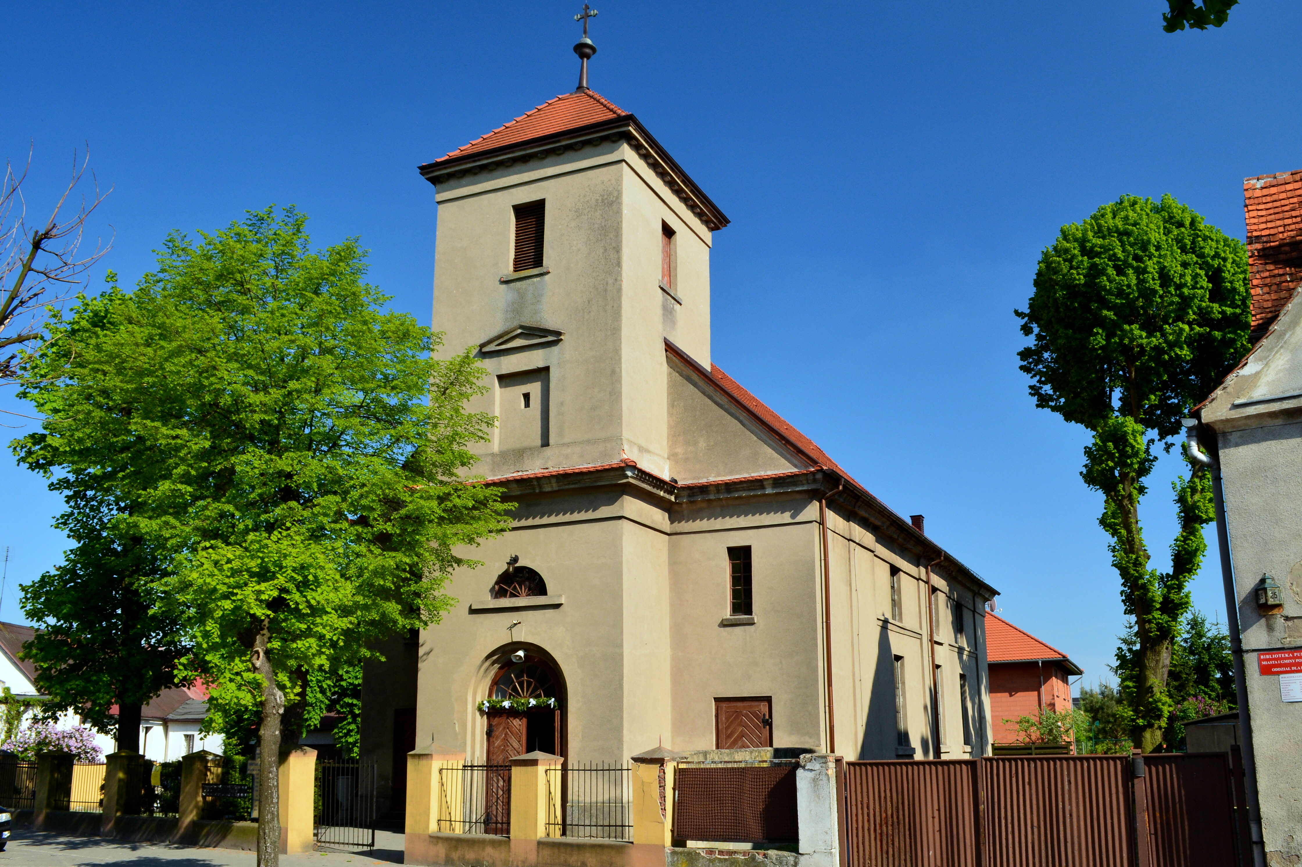 Pobiedziska, kościół ewangelicki, ob. rzym.-kat. p.w. Św. Ducha, 1 ćw. XIX